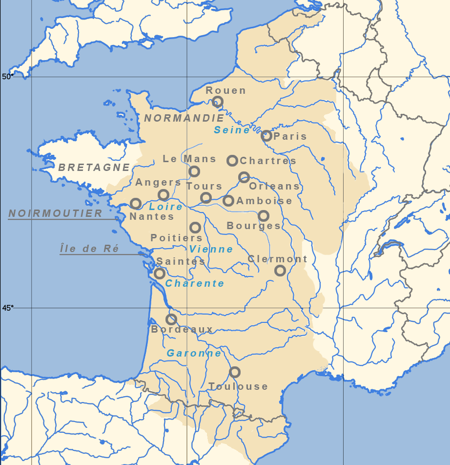 Westfrankenreich seit 843 (braun) und von Normannen heimgesuchte Städte an der Loire und der Seine (Auswahl)